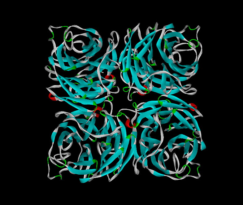 神经氨酸酶四桔体